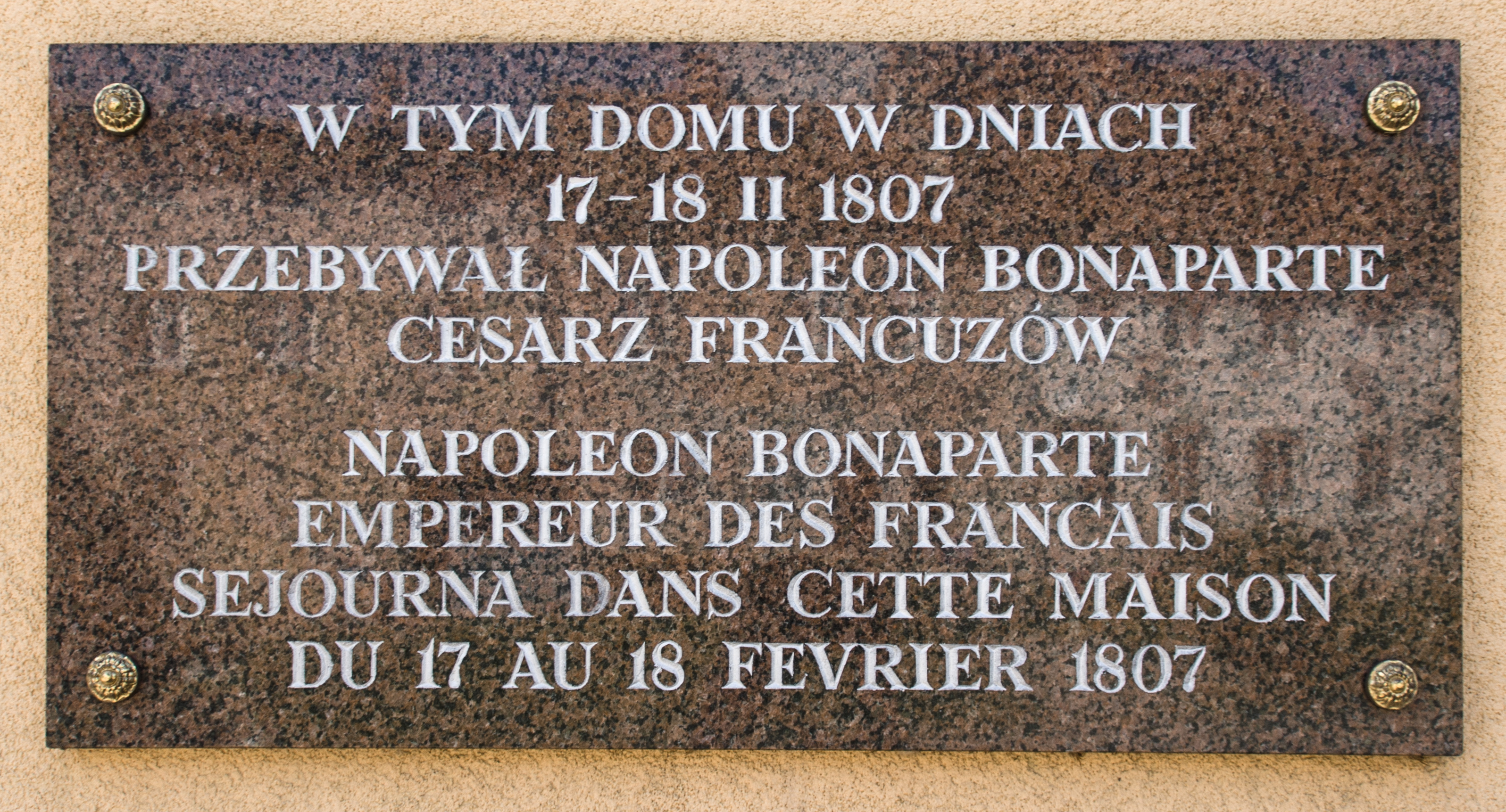 Plebania przy cerkwi greckokatolickiej Podwyższenia Krzyża Świętego, ul. ks. Mirosława Ripeckiego 1, Górowo Iławeckie. W tym domu w dniach 17-18 II 1807 przebywał Napoleon Bonaparte Cesarz Francuzów.